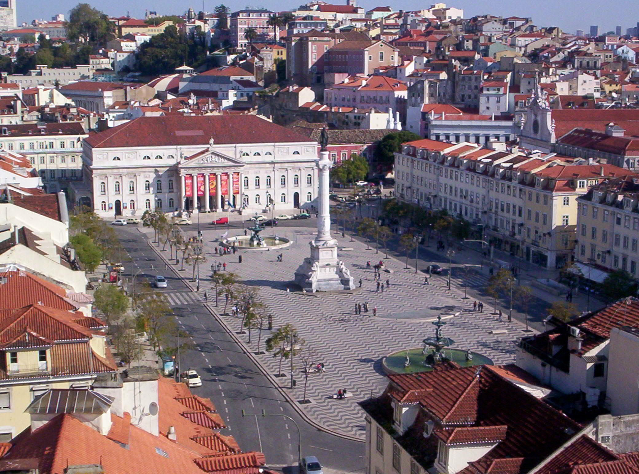 Praça Don Pedro IV (Rossio)